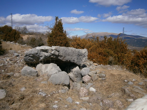 foto del dolen de montcortes.